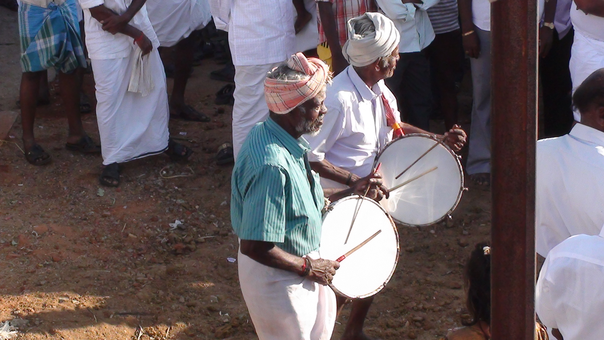 திருவிழாவில் பறையிசை முழங்கும் காட்சி